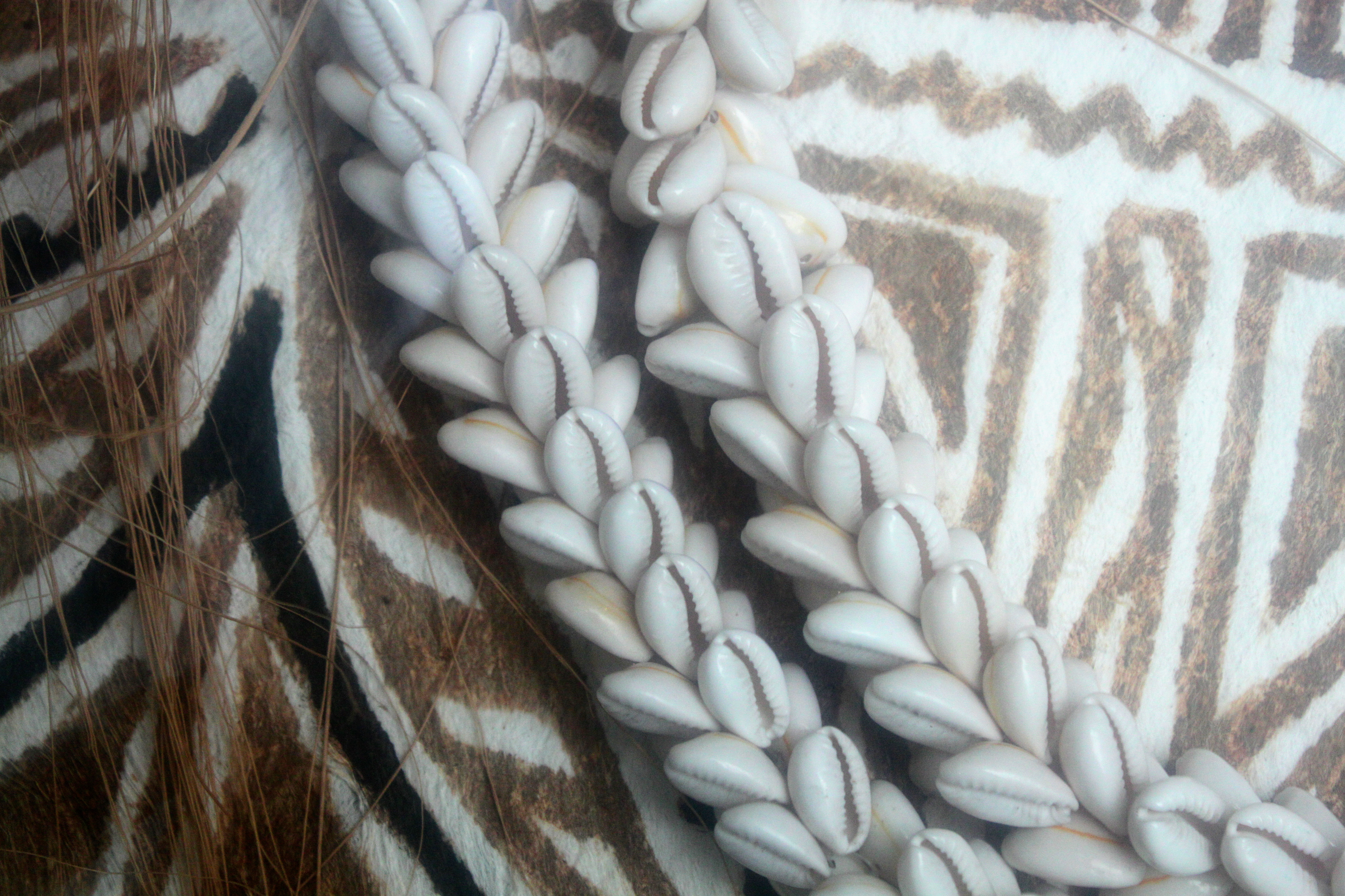 Kaurischnüre - verwendet als Kaurischmuck, früher als Kaurigeld; Souvenir aus Samoa